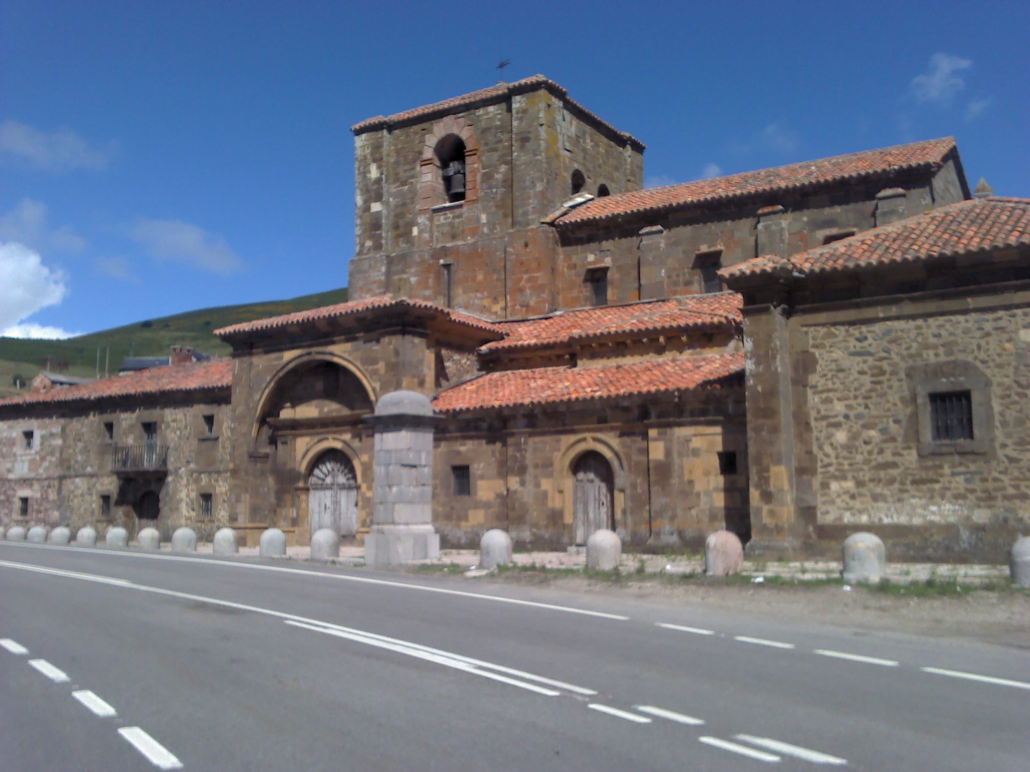 Santa María de Arbas - Vista desde la Carretera